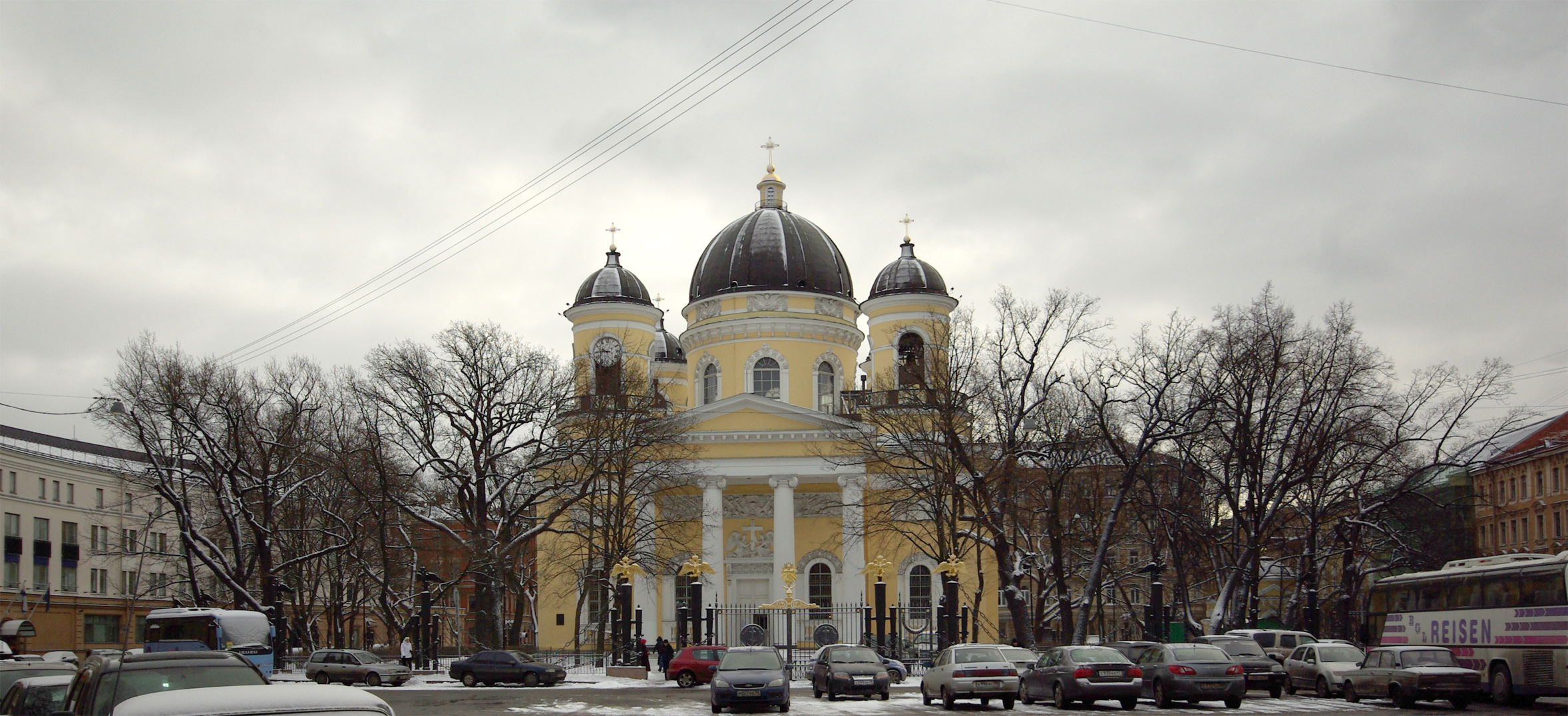 Спасо-Преображенский собор (Санкт-Петербург)